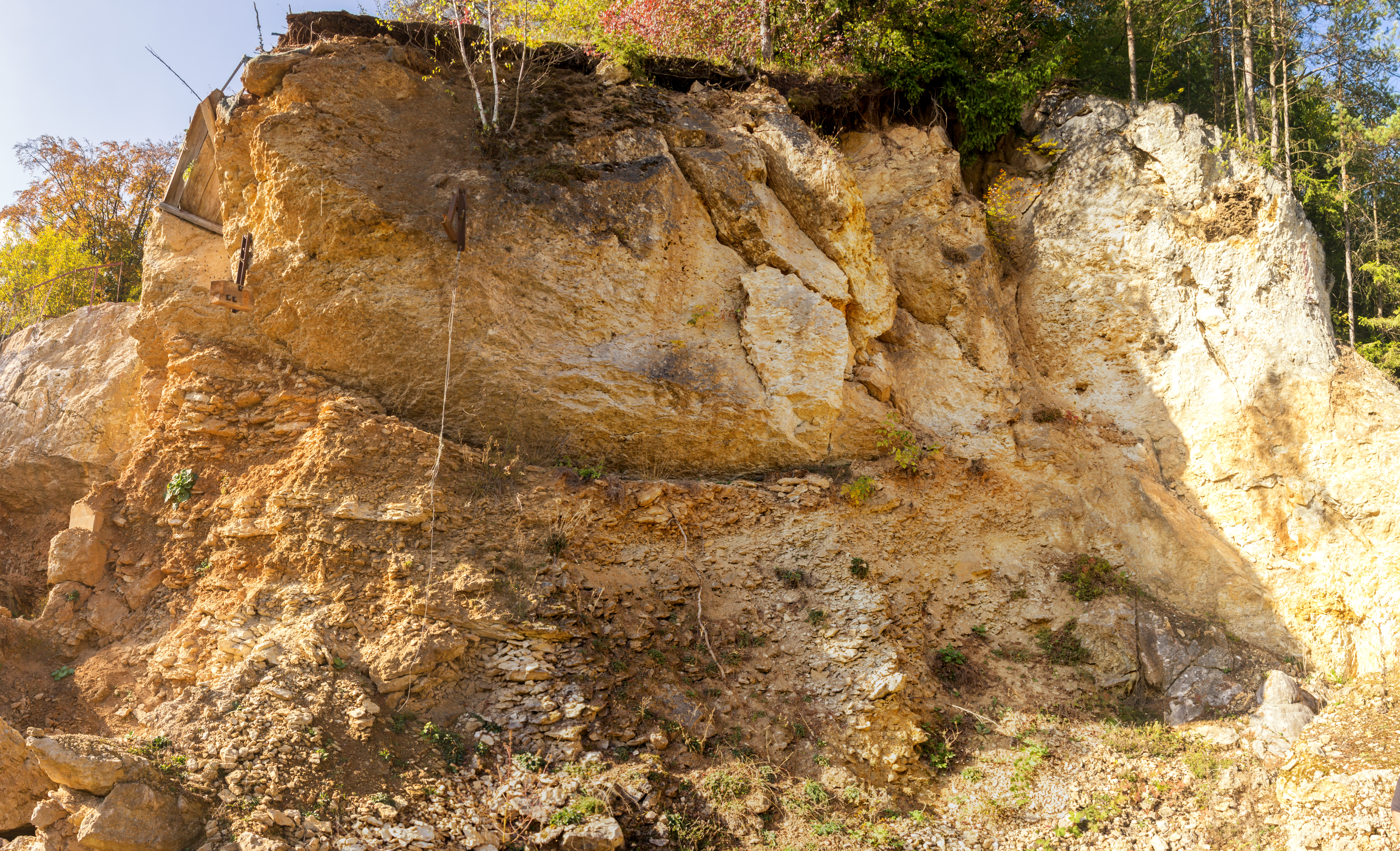 Steinberg-Höhlenruine, A 236, Hunas